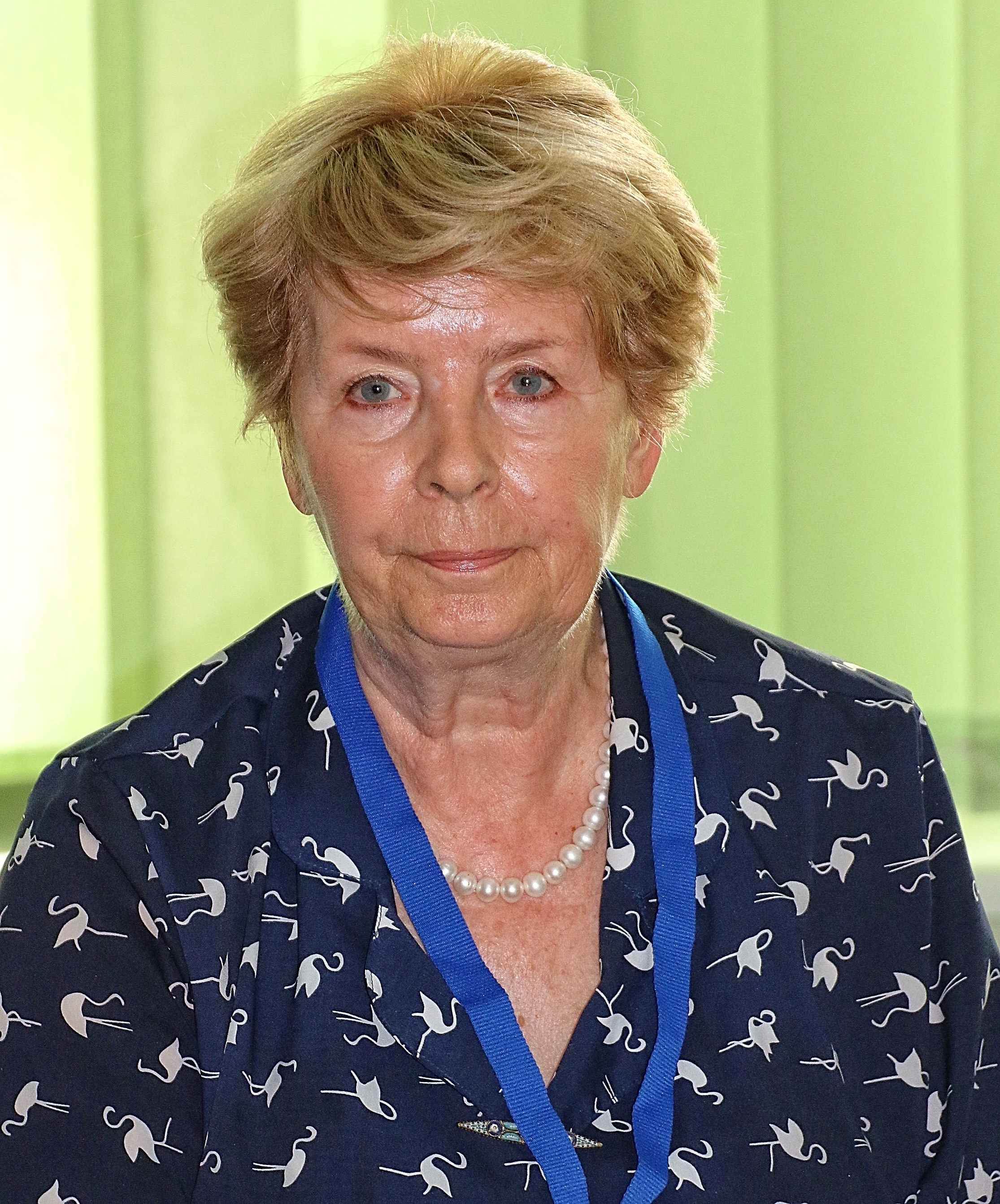 Prof. Zdzisława Janowska na konferencji Przyszłość HR z perspektywy nauki i biznesu. Wyzwania, trendy, dobre praktyki w Wyższej Szkole Finansów i Zarządzania w Warszawie